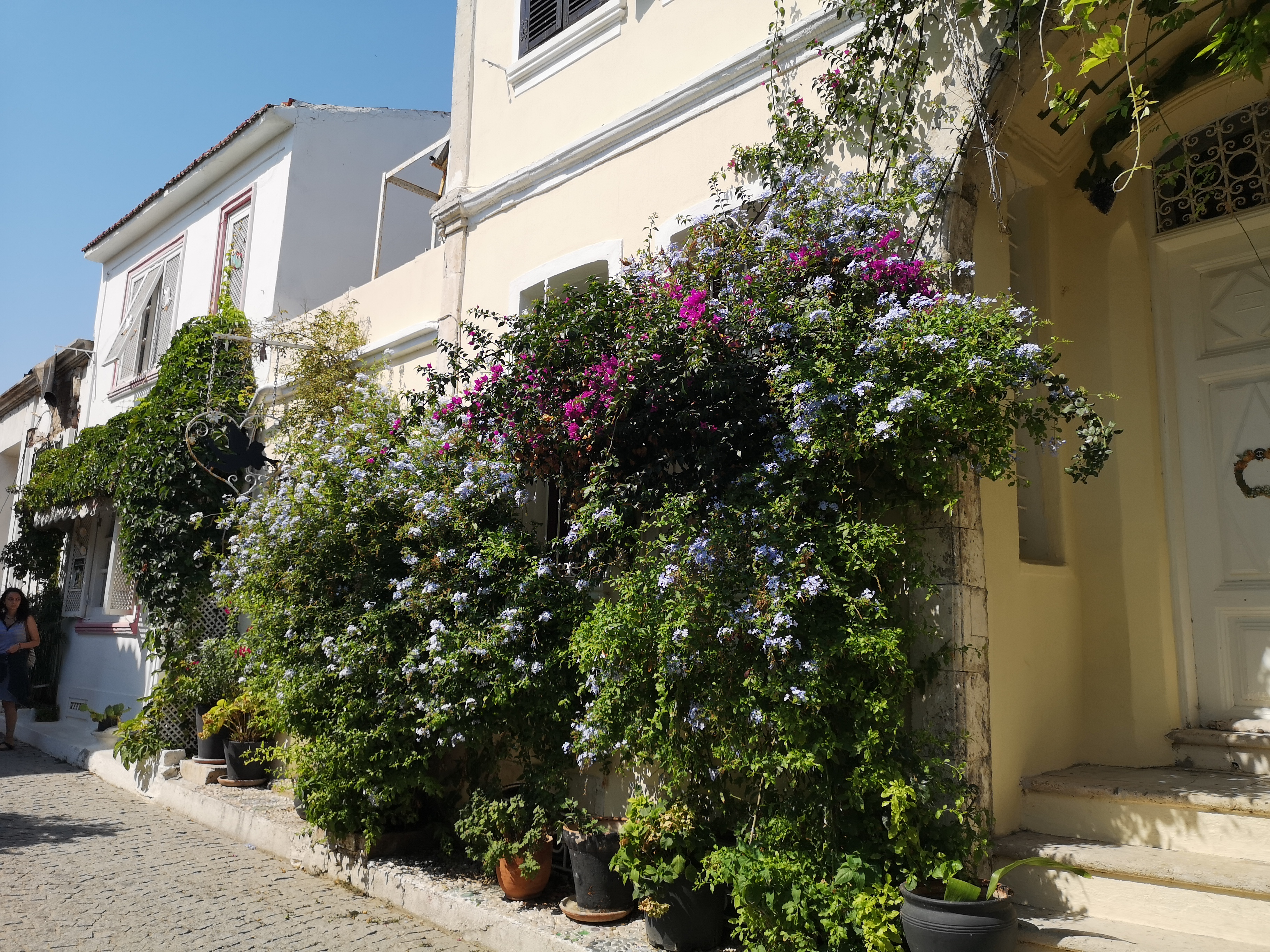 Bozcaada, Çanakkale, 2019